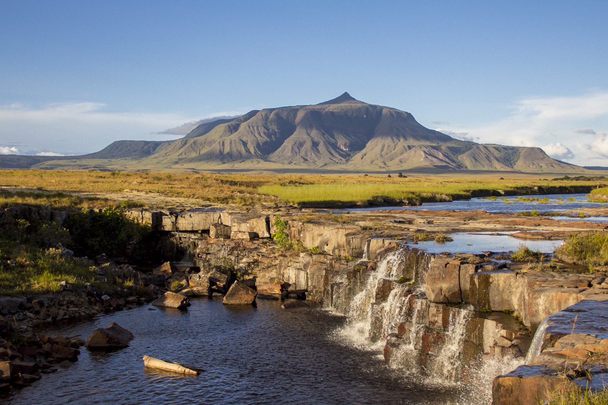 Viajando y conociendo mi hermoso país desde el año 2008. Cada vez más orgulloso de ser Venezolano!.